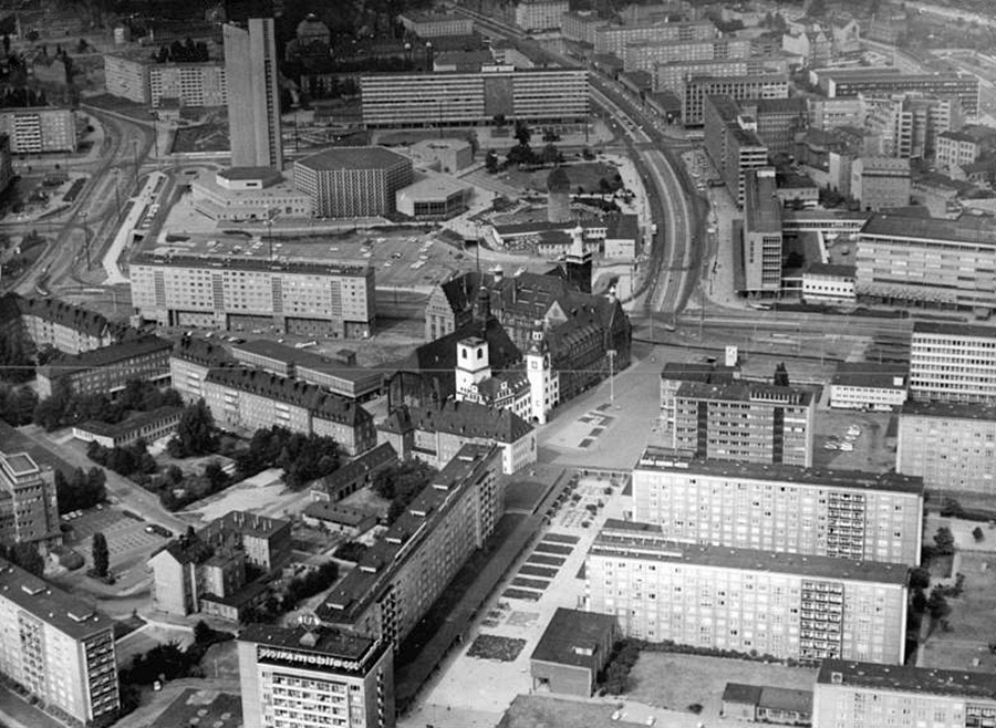 ADN-ZB Thieme 31.3.77 Karl-Marx-Stadt: Luftaufnahme von Karl-Marx-Stadt mit dem Rathhaus (Bildmitte), der Straße der Nationen und der Stadthalle mit dem Interhotel "Kongreß". (Luftbildnummer: ZLB-L 2134-76)